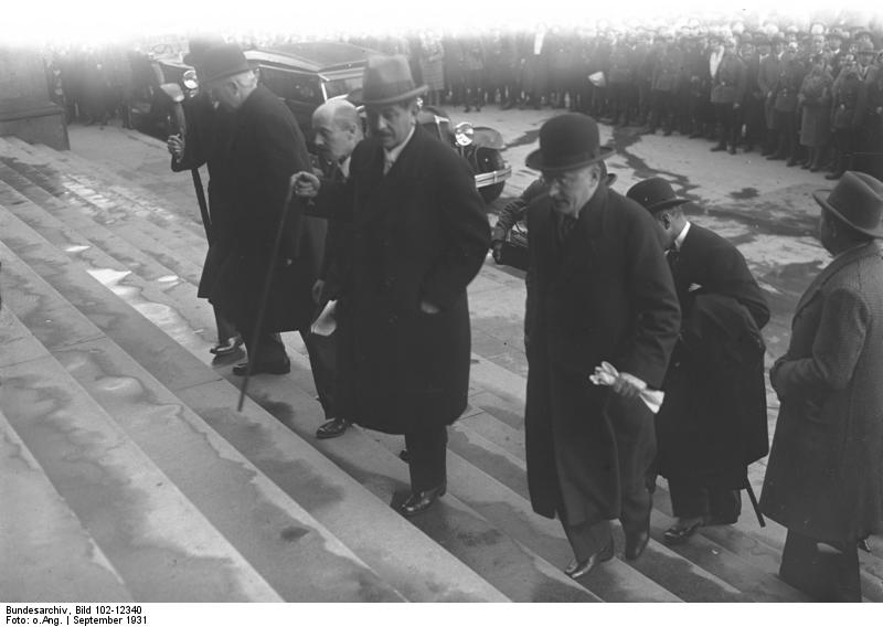 Der französische Ministerbesuch in Berlin ! Der französische Ministerpräsident Laval besichtigt das Pergamon-Museum in Berlin. Von rechts nach links: Reichskanzler Dr. Brüning, der französische Ministerpräsident Laval.